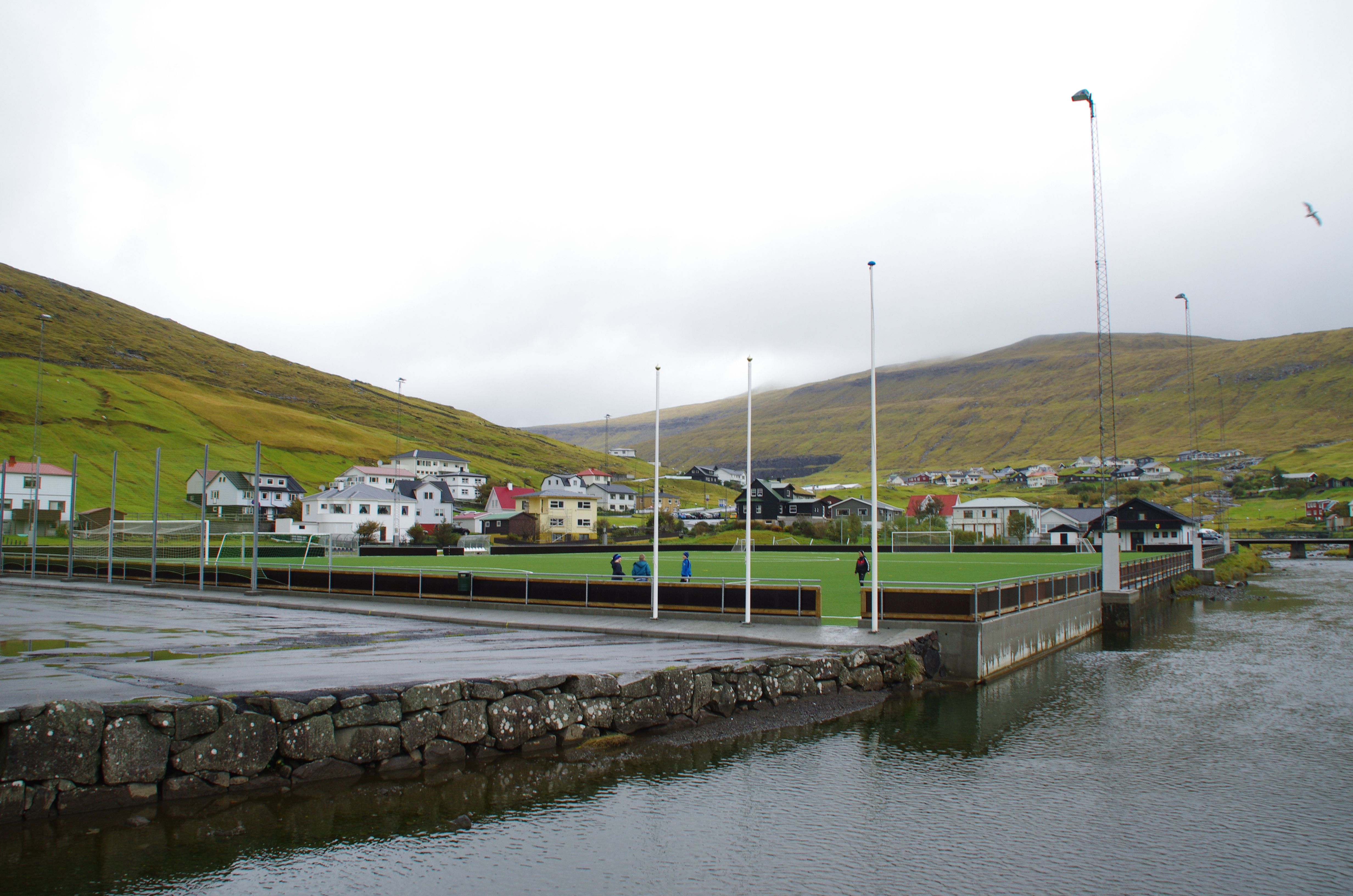 Sandavágur mit dem Sportplatz in der Nähe der Kirche.